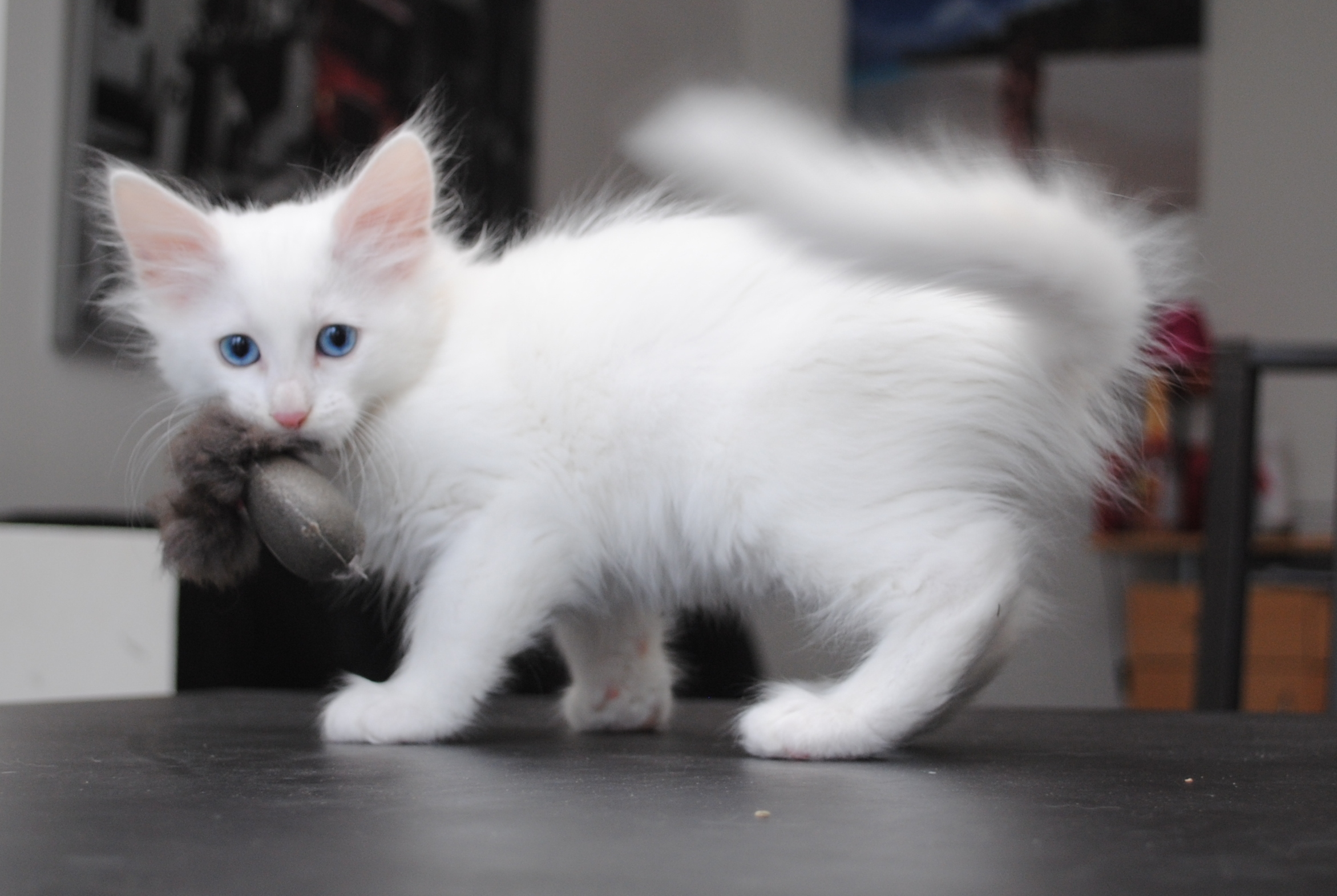 Haribo est un chaton Angora Turc né à la Chatterie du Soleil d'Ankara qui adore jouer.